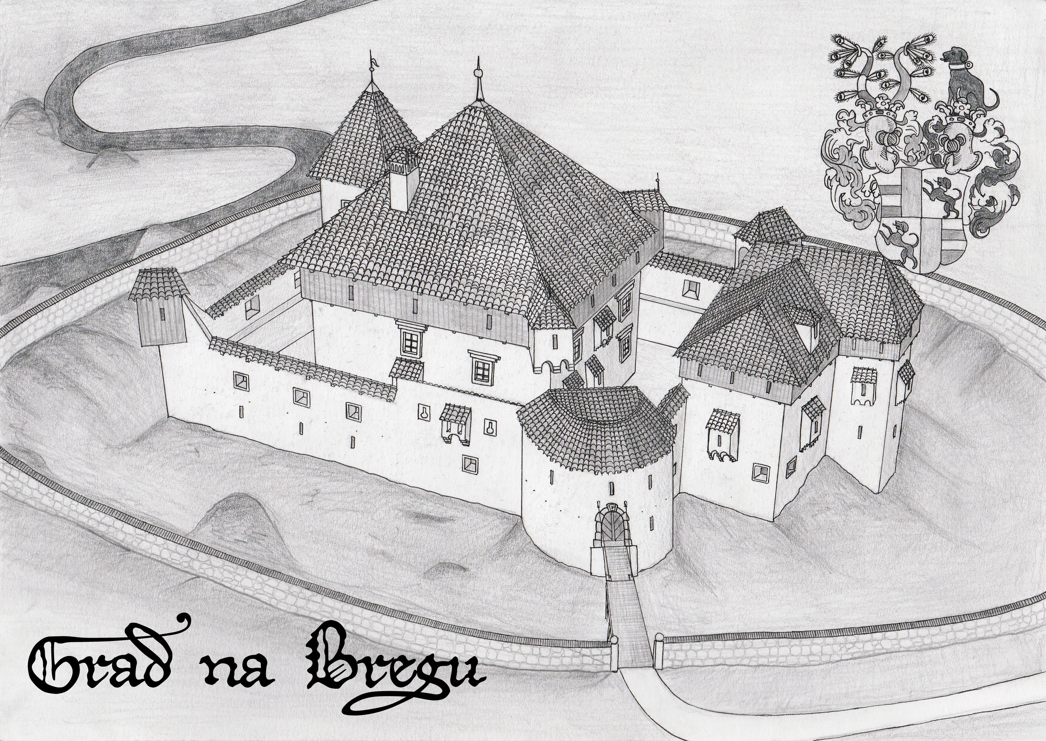 Poskus rekonstrukcije stolpastega dvora Grad na Bregu. Delano na osnovi tlorisa, katerega je izrisal izr. prof. dr. Igor Sapač, univ. dipl. Inž. arh. & univ.dipl.umet.zgod. in Valvasorjevi topografiji iz leta 1679. Grb plemiške družine Lamberg iz 16. stol.